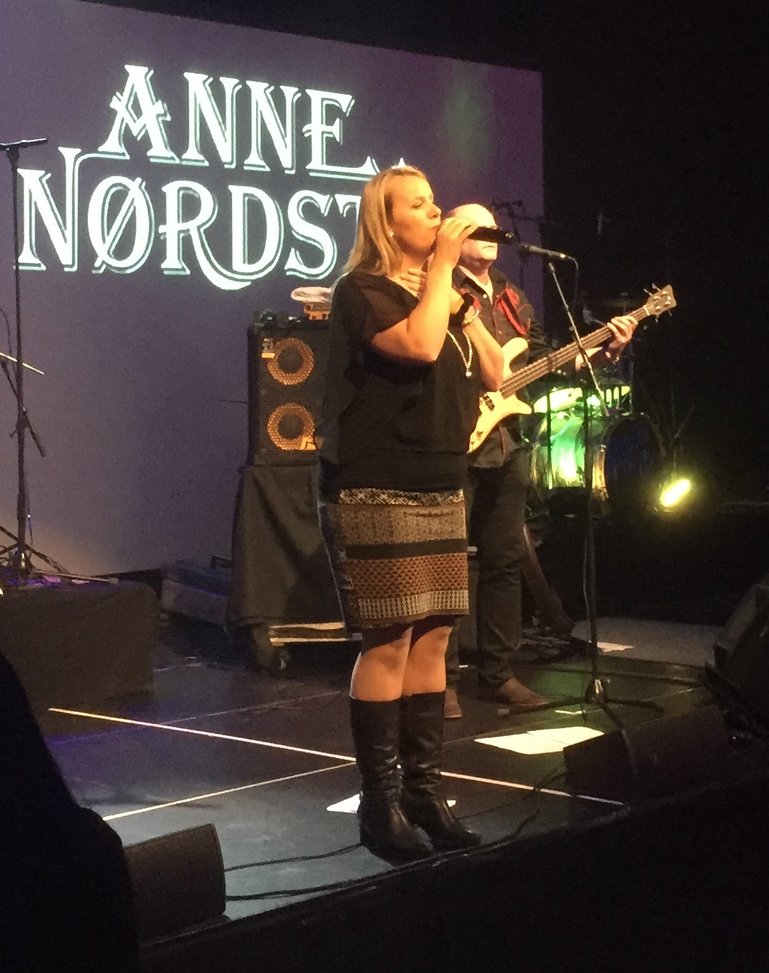 Anne Nørdsti på dansegalla på Panorama Hotell & Resort 4. februar 2017